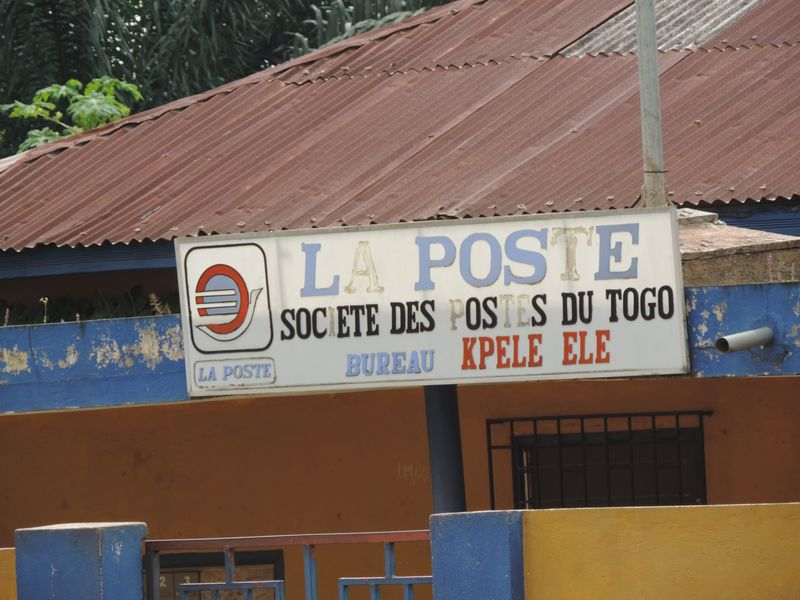 Bureau de poste au Togo 2017